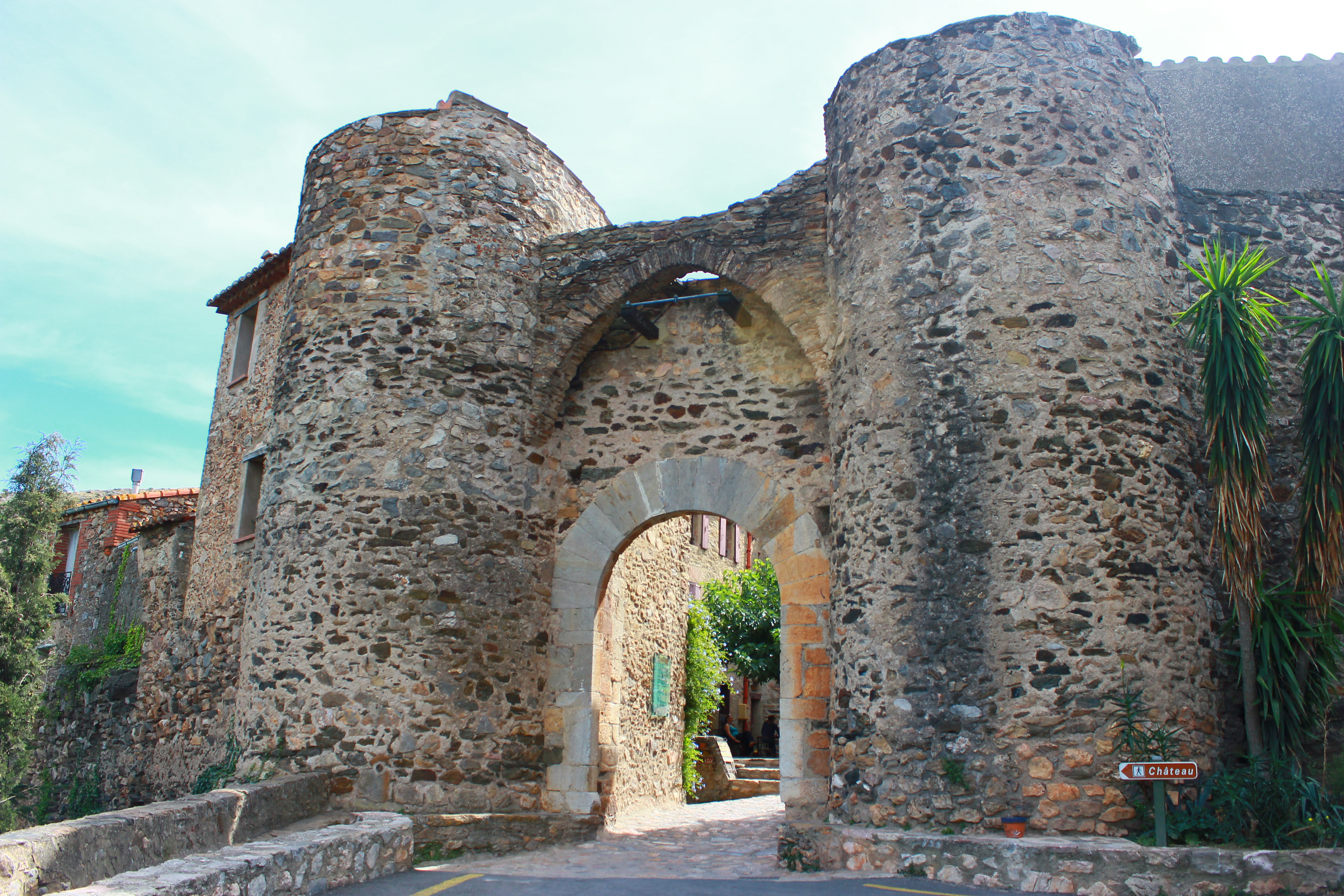 Castelnou (66), un des plus beaux village de France29